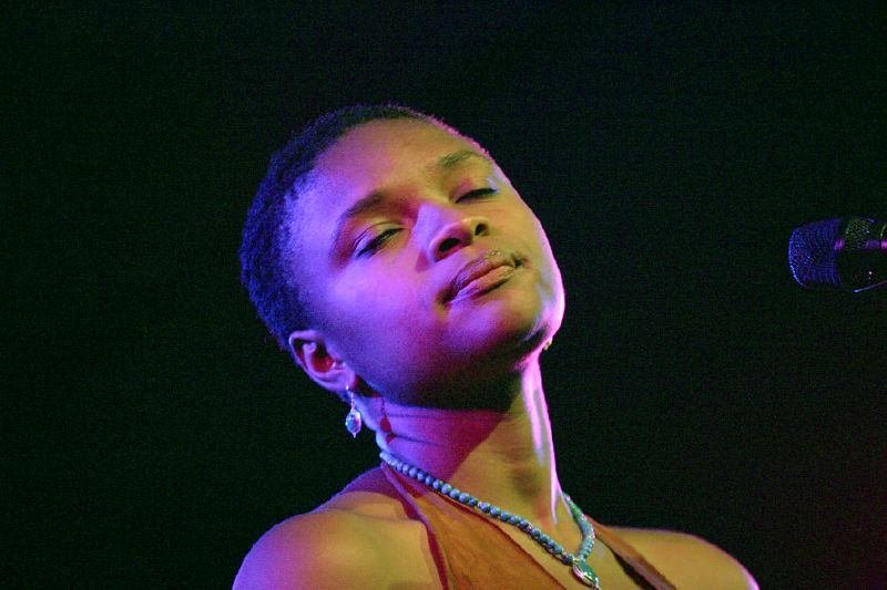 Lizz Wright